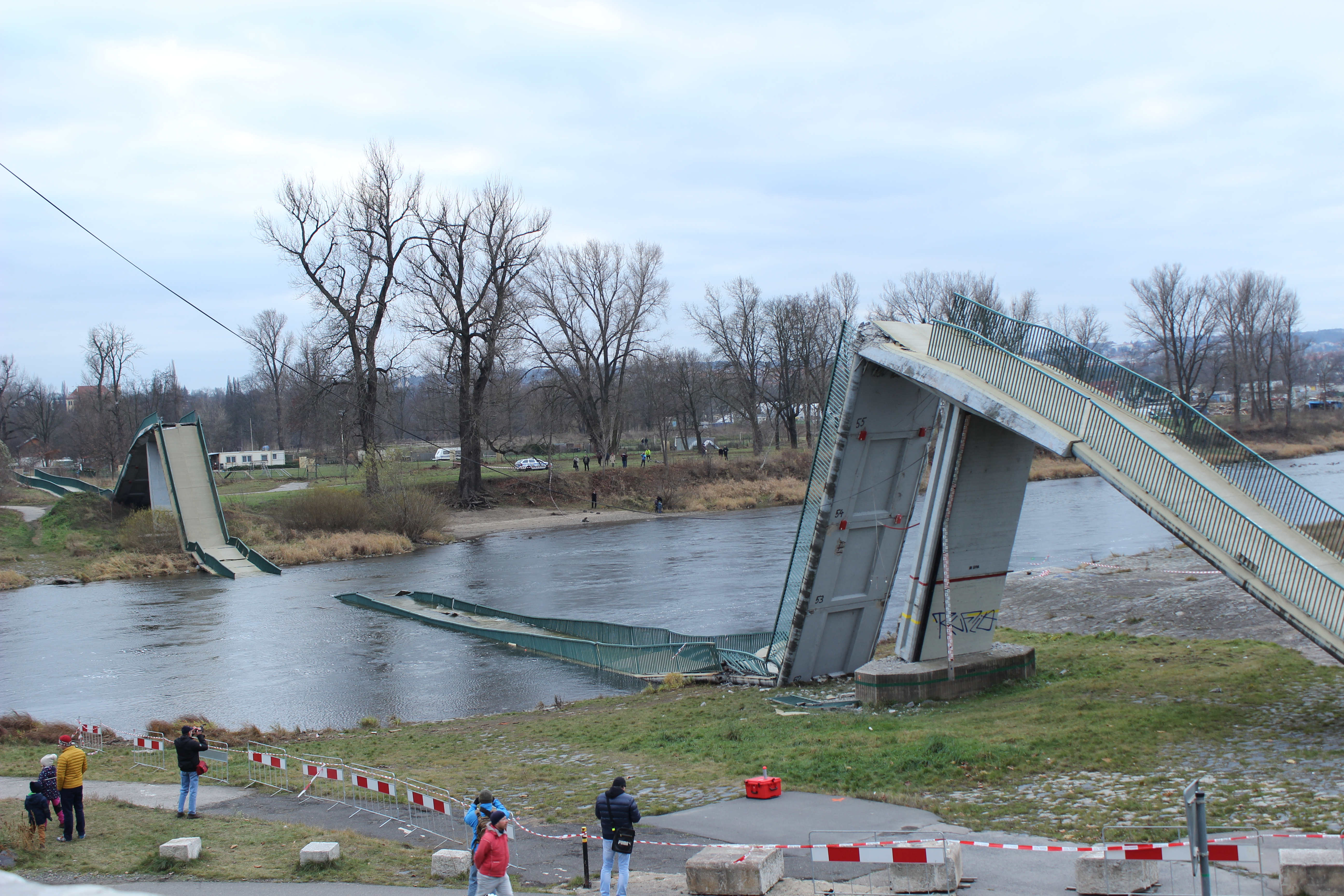 Zřícená Trojská lávka zachycená den následující po neštěsí, tedy 3. prosince 2017.